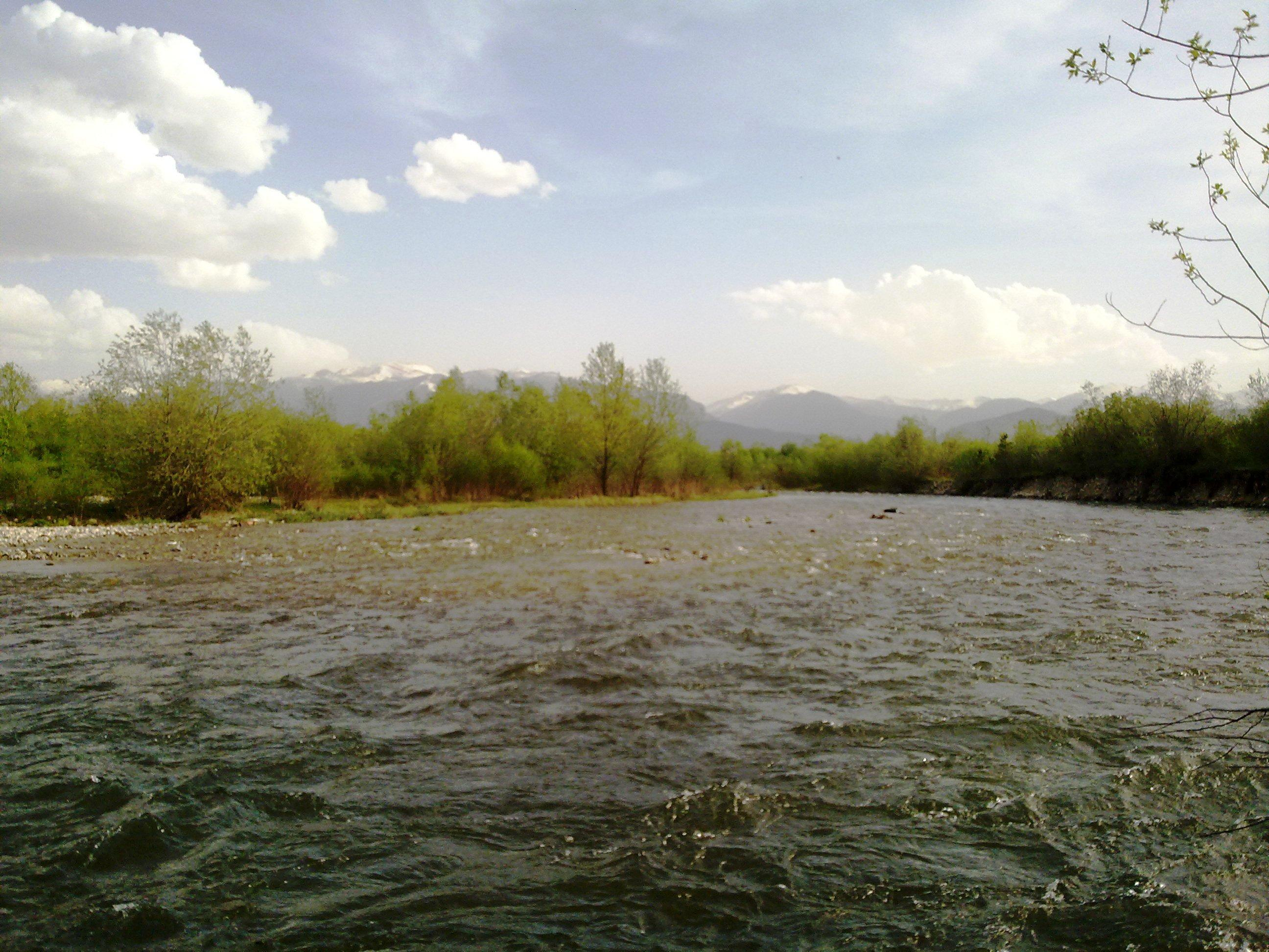 Река Искър край Драгушиново